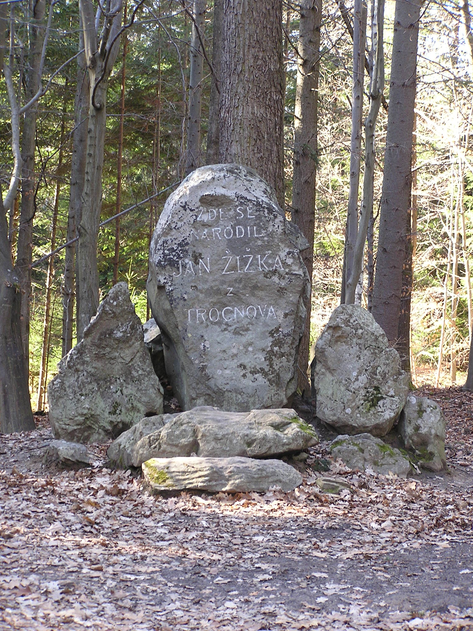 Místo, kde stával dub, pod kterým se narodil Jan Žižka